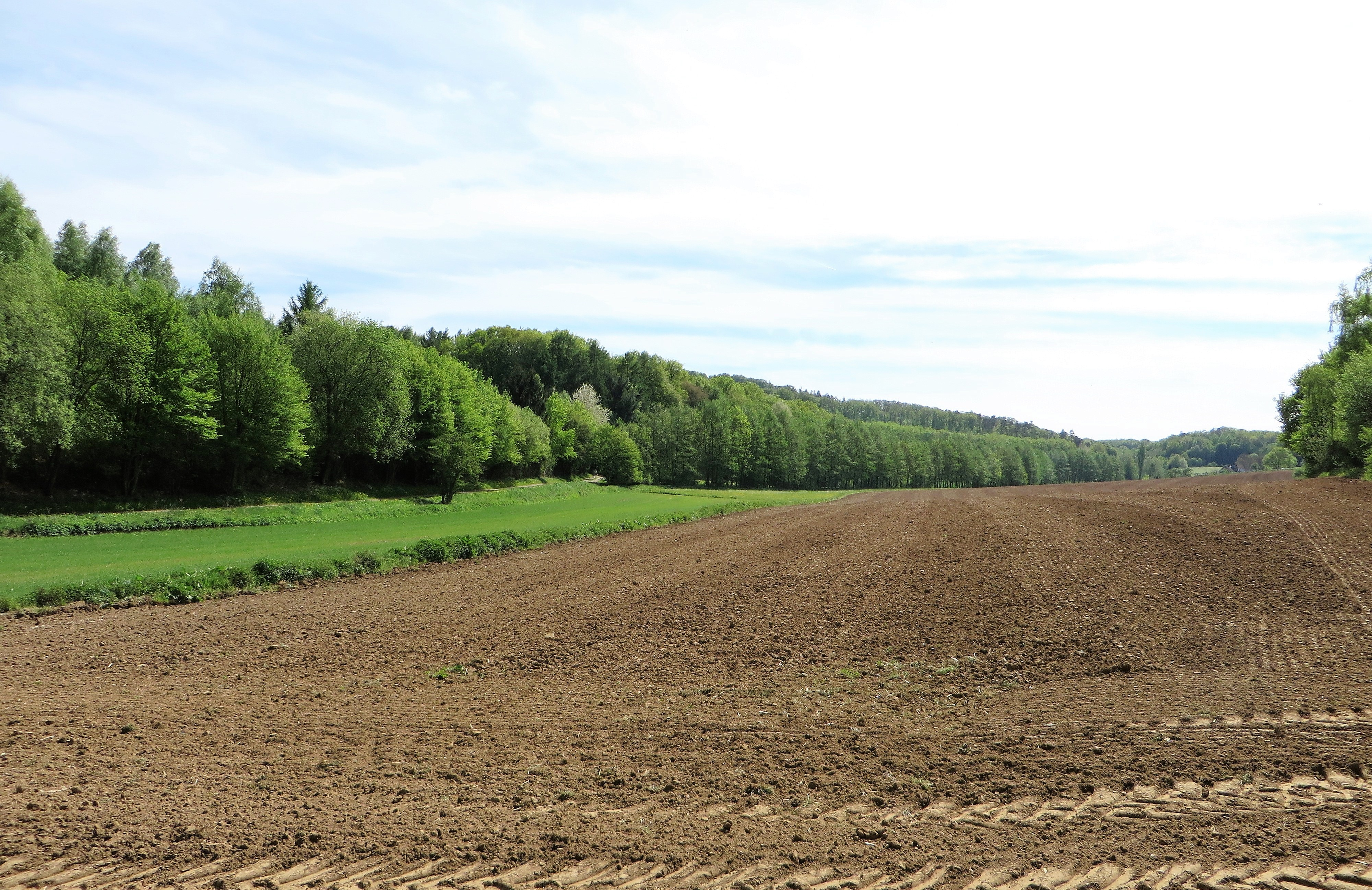 Naturschutzgebiet HA-003 „Lange Bäume“ in Hagen-Holthausen. Das Schutzgebiet wird im Norden und im Osten durch die Straße „Zur Hünenpforte“ und die Ortschaft Holthausen begrenzt. Der Milchenbach fließt durch das Gebiet, dessen wesentlicher Bestandteil ist ein Buchenaltholz auf einem hier hoch anstehenden Massenkalkvorkommen. Ein sehr gut ausgebildeter Perlgrasbuchenwald befindet sich im Süden des Gebietes. Die übrigen Bereiche werden von einer Schlagflur mit entsprechend zahlreichen Brutvogelvorkommen und einem extensiv genutzten Wiesengrünland eingenommen.